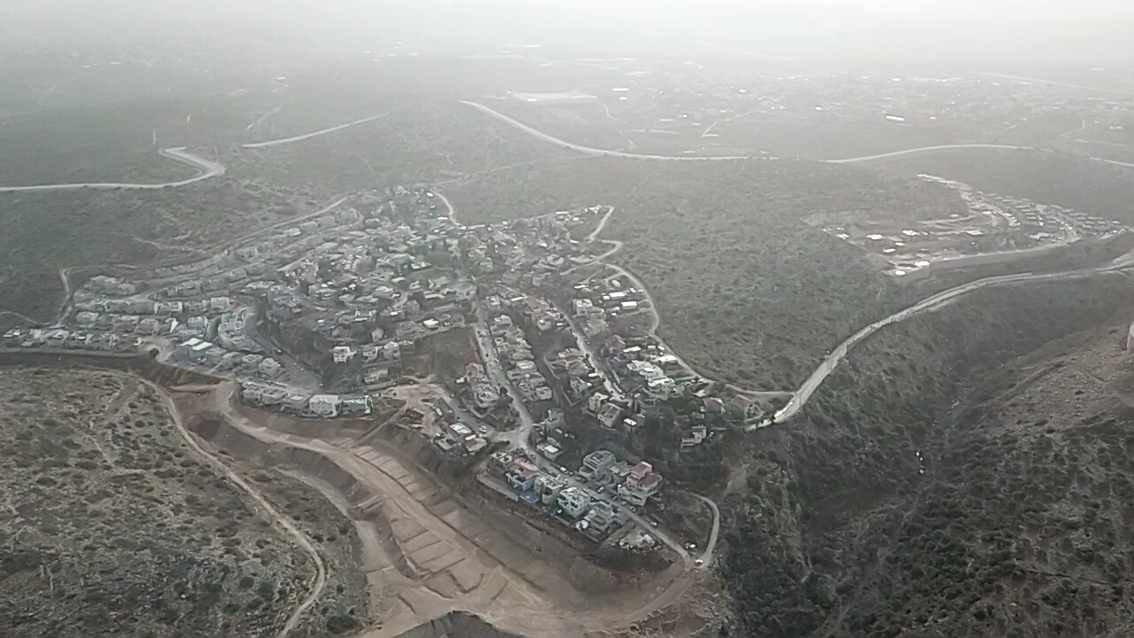 היישוב עץ אפרים, בחלק הימני של התמונה - שכונת רמת עץ אפרים (2019)